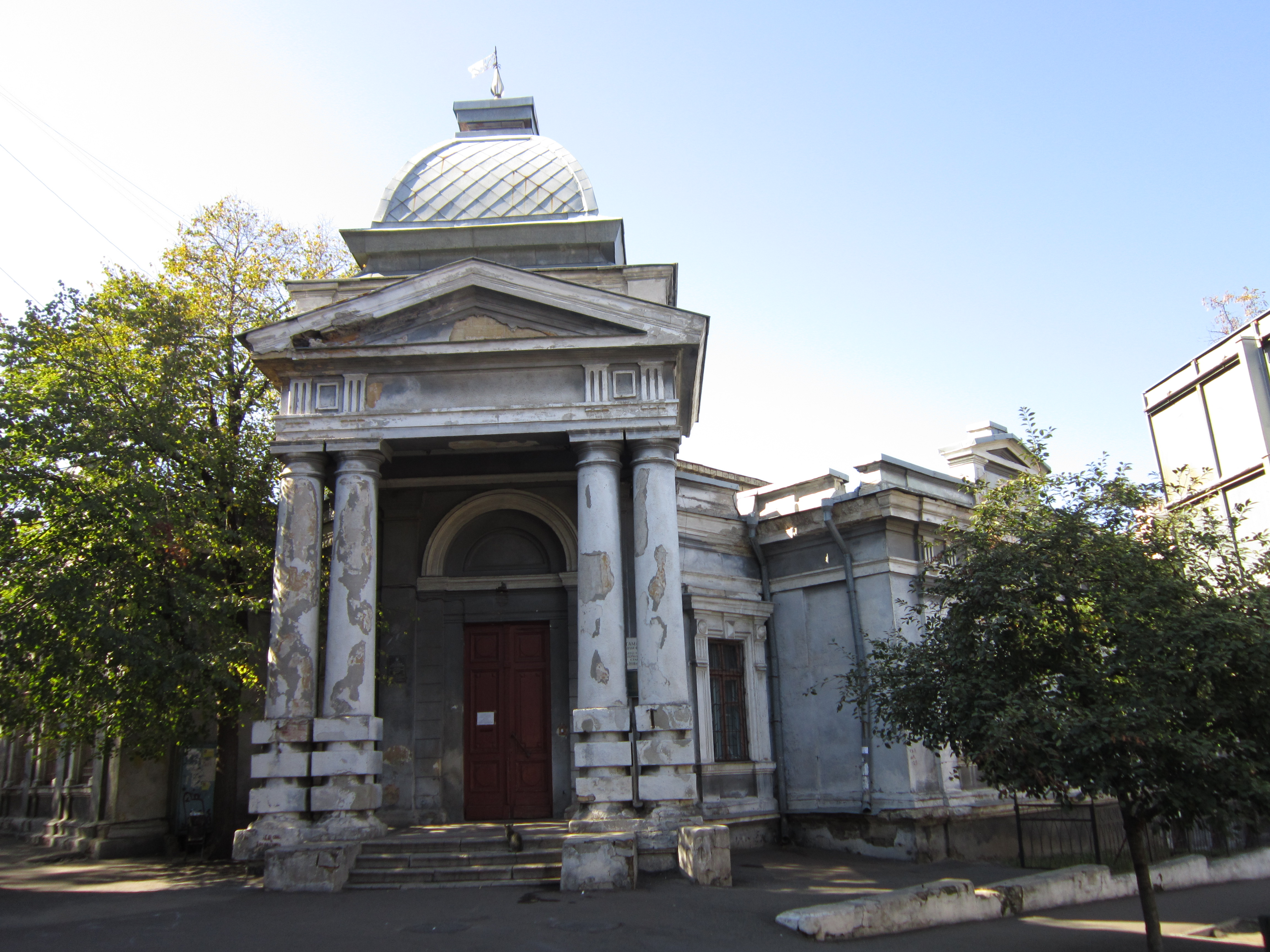 Будівля Бактеріологічної станції, де працювали:- у 1886-1888 рр. М.Ф. Гамалея – мікробіолог, епідеміолог;- у 1895-1907 рр. П.Н. Діатроптов, мікробіолог, професор- Я.Ю. Бардах - лікар, професор, Одеса, Пастера вул., 2 (ріг вулиць Пастера, 2 та Старопортофранківської(Комсомольської)